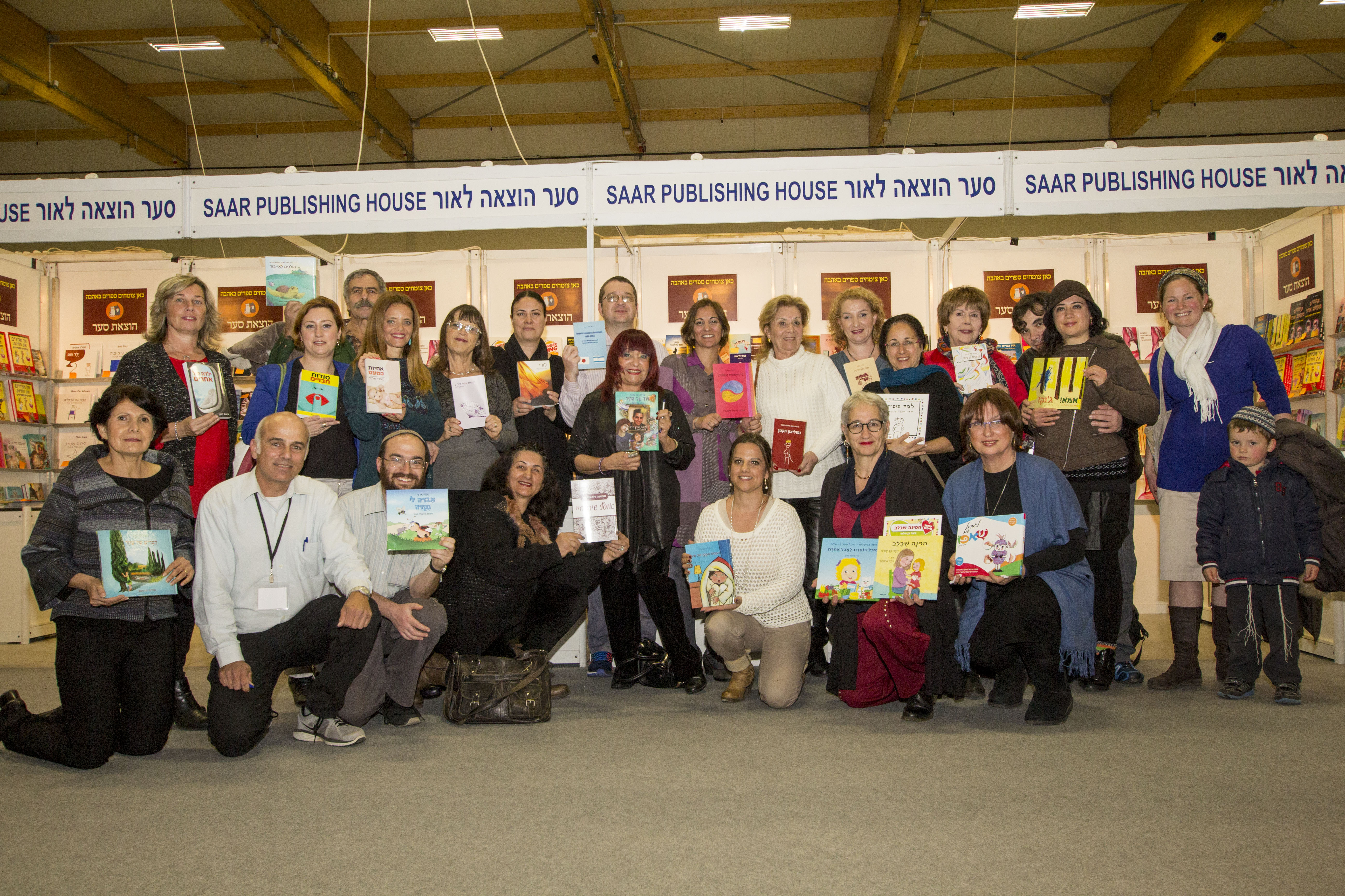 המו"ל וסופרי הוצאת סער ביריד הספרים בירושלים 2015